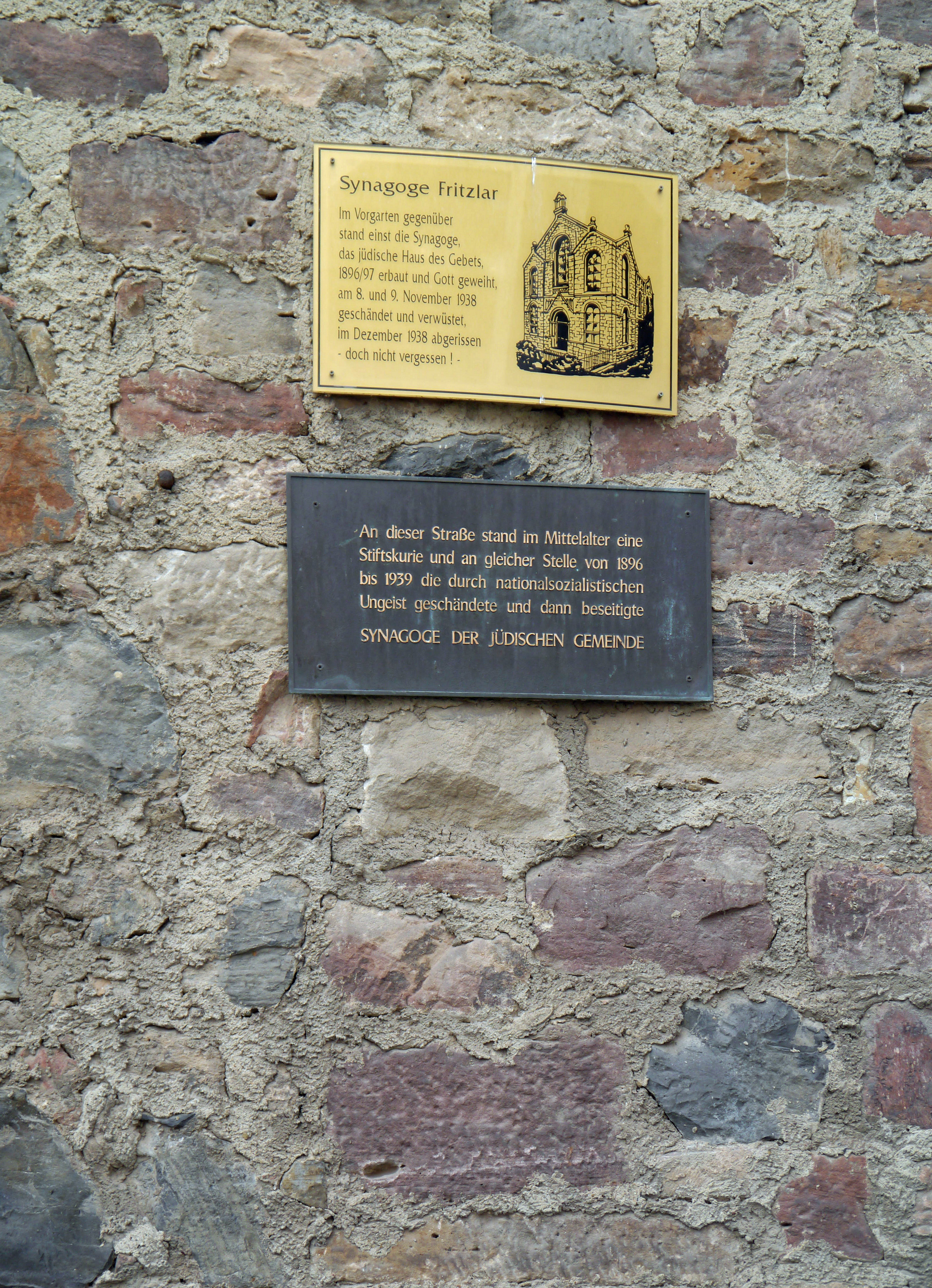 Informationstafel in der Nähe der 1938 abgerissenen Synagoge in Fritzlar.